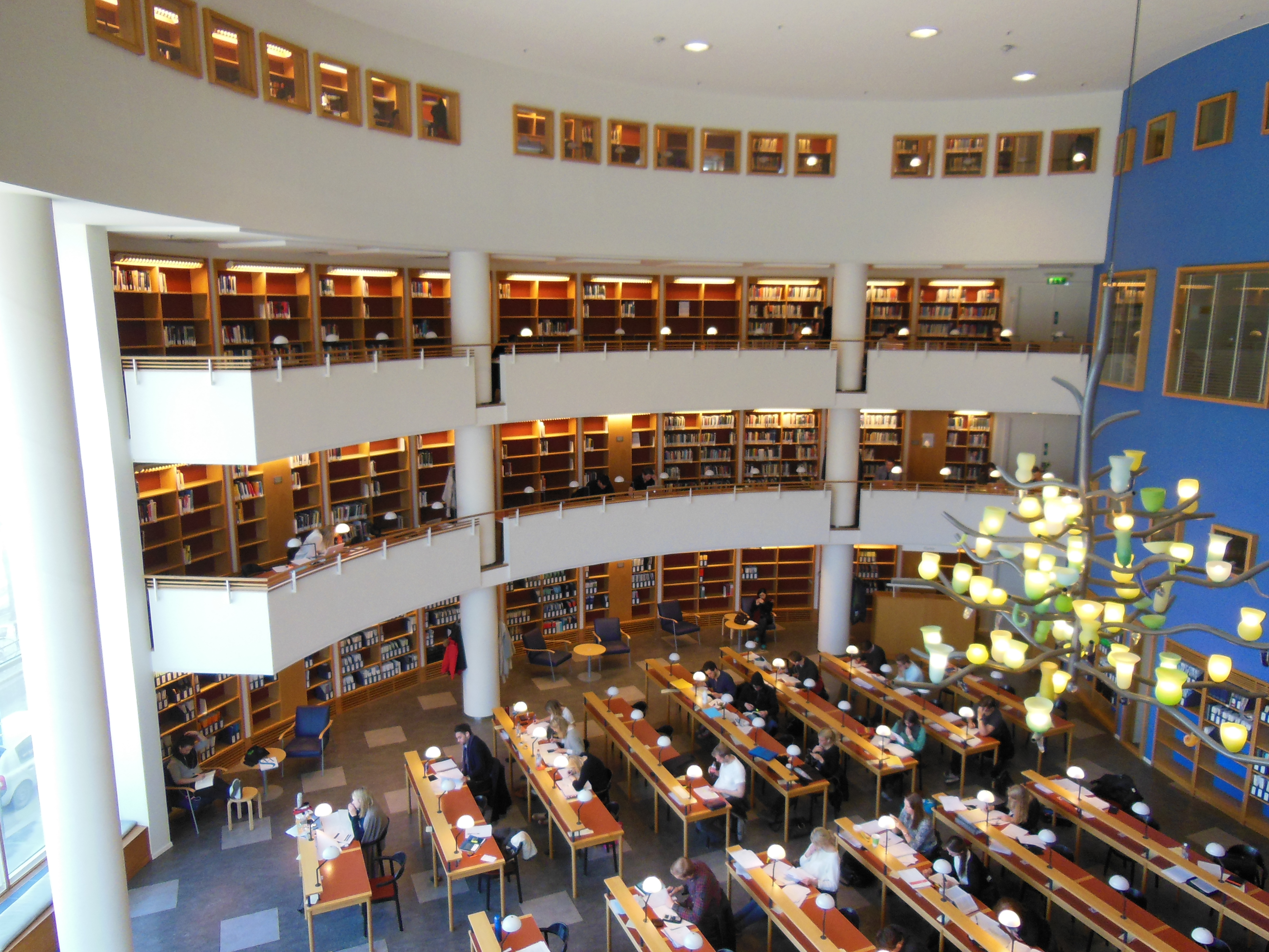 Läsesalen på Handelshögskolan i Göteborg.